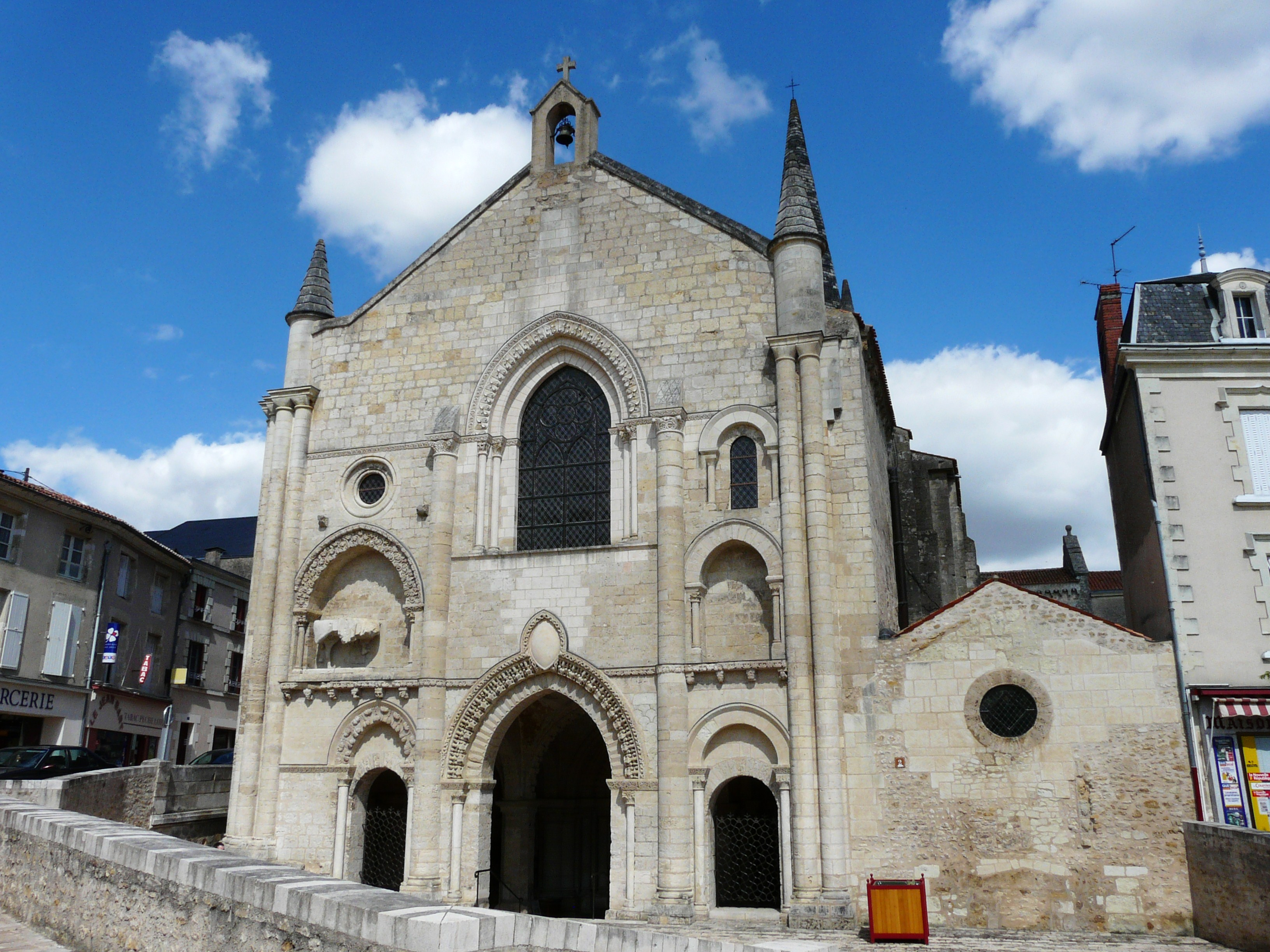 L'église abbatiale Saint-Pierre d'Airvault, Deux-Sèvres, France